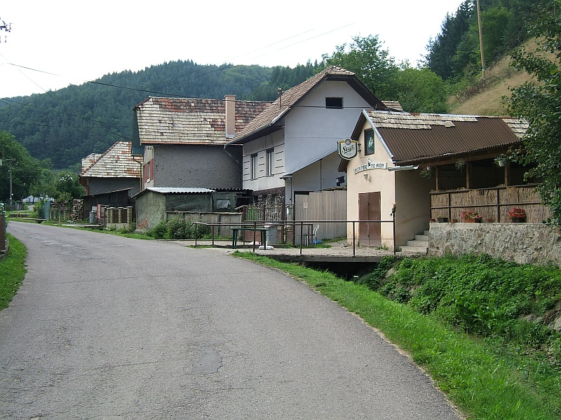 Šášovské podhradie_bufet